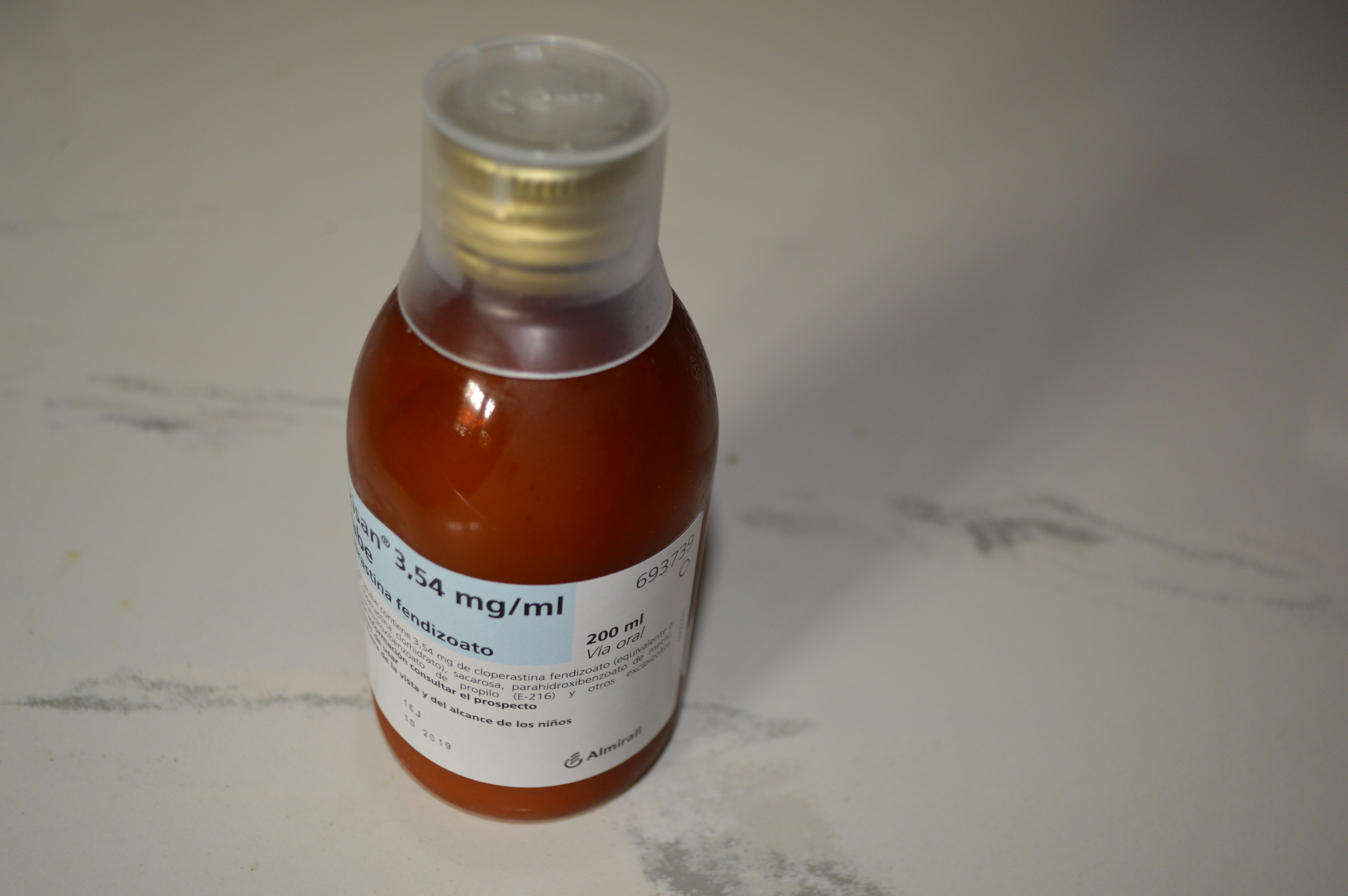 Caixa d'un antitossiu d'Almirall.